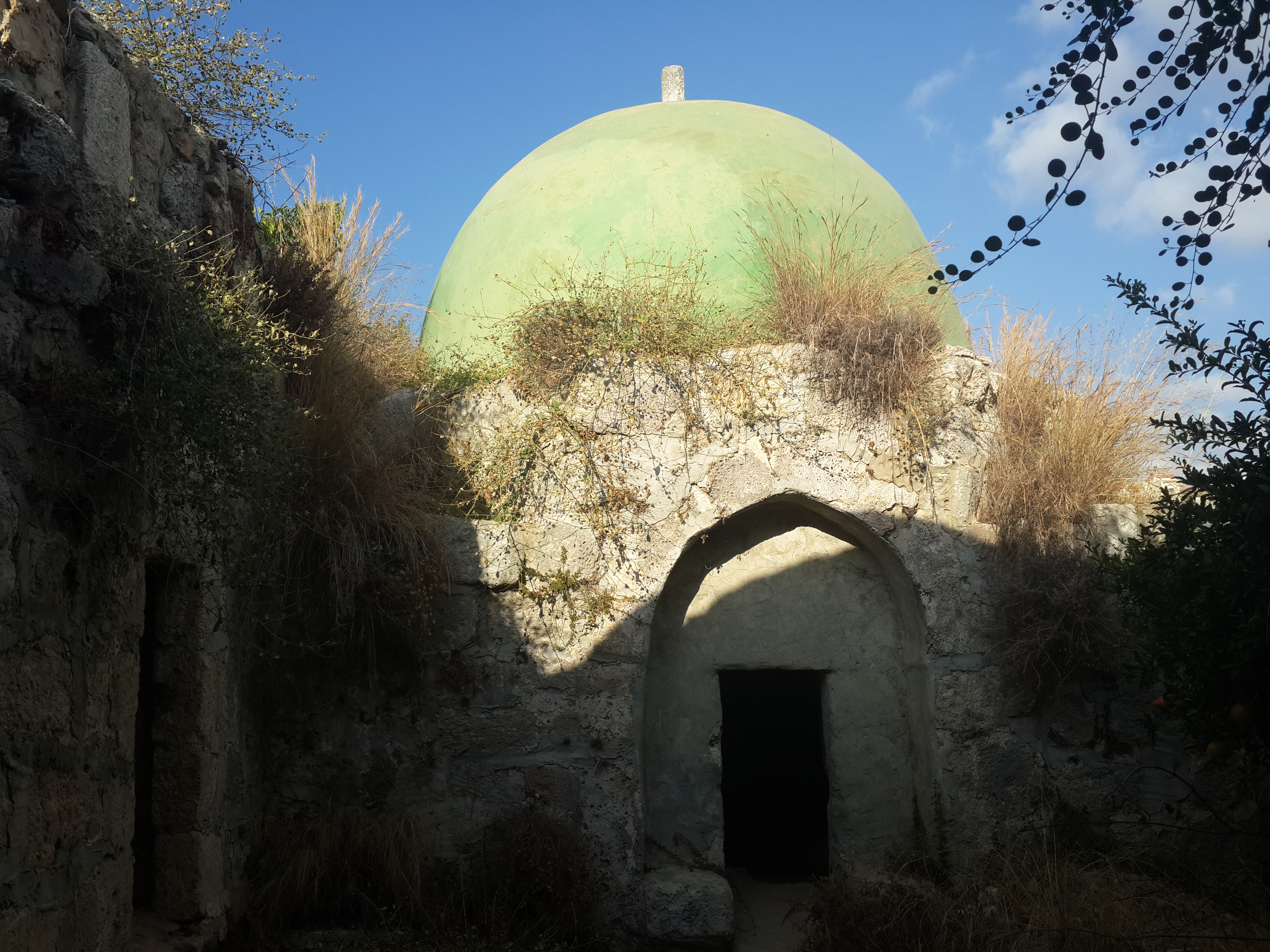 se trouve dans la quartier"ancienne ville"